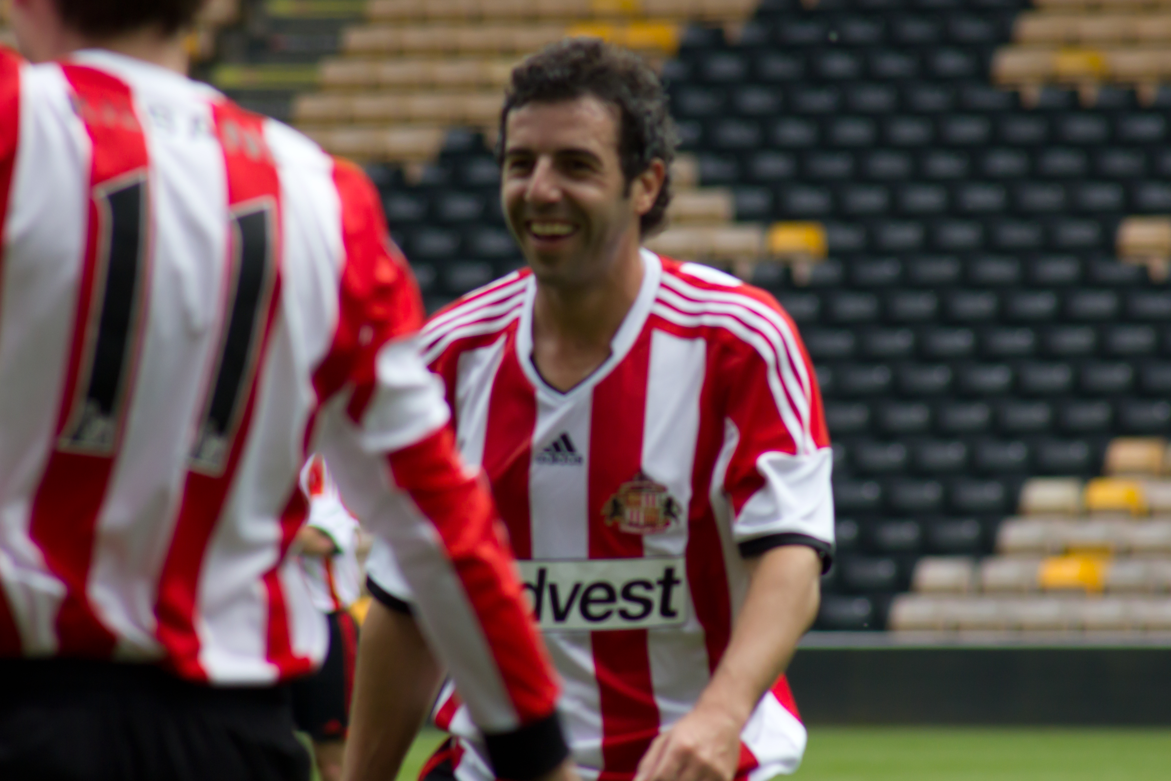 Julio Arca